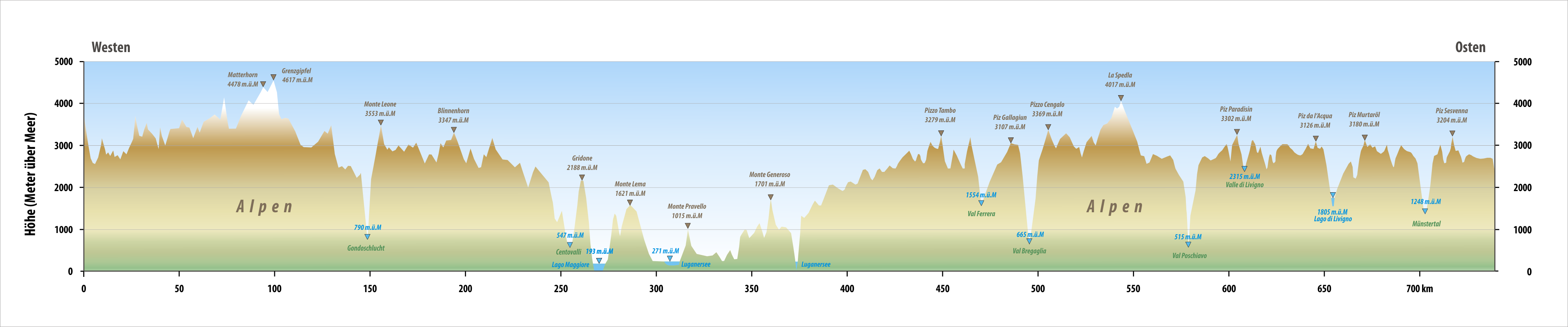 Diagramm des Grenzverlaufes zwischen der Schweiz und Italien